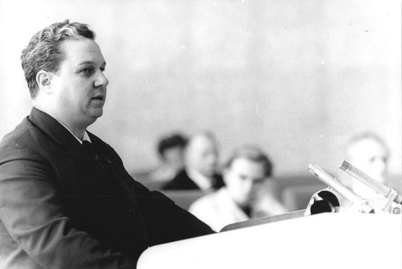 Zentralbild Koard-16.5.1969 Berlin: Bedeutsame 17. Sitzung des Staatsrates der DDR im Amtssitz am Marx-Engels-Platz. Im Amtssitz des Staatsrates am Marx-Engels-Platz: Der Oberbürgermeister von Karl-Marx-Stadt, Kurt Müller, sprach in der Diskussion über die Entwicklung der gesellschaftlichen Beziehungen in der sozialistischen Großstadt.